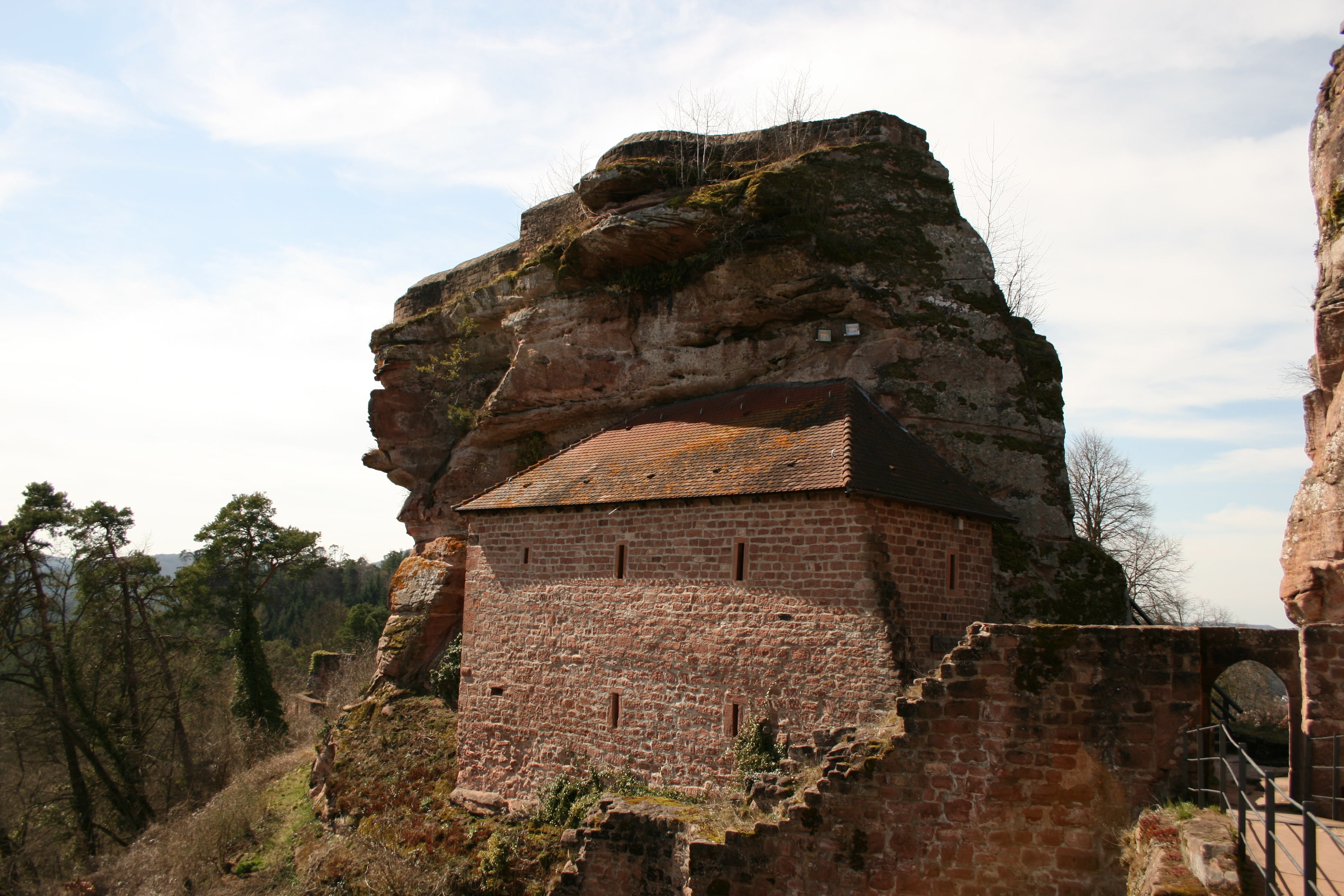 Burgfelsen der Burg Grafendahn von Osten, im Vordergrund das Burgmuseum. Teil der Dahner Burgengruppe in Rheinland-Pfalz.